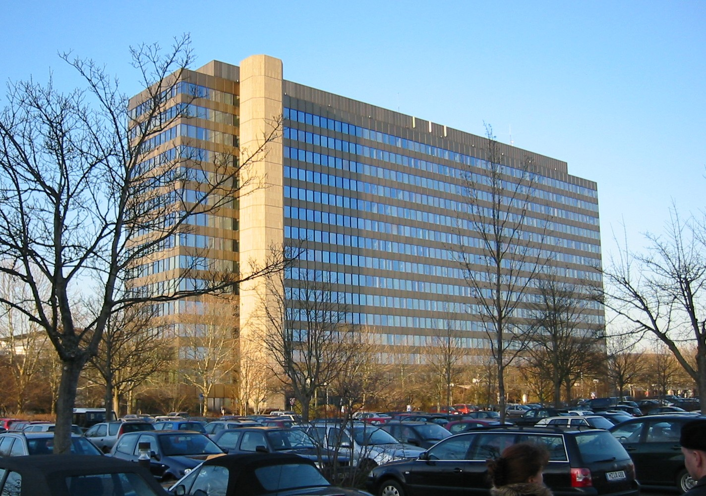 Die ZDF-Zentrale in Mainz.